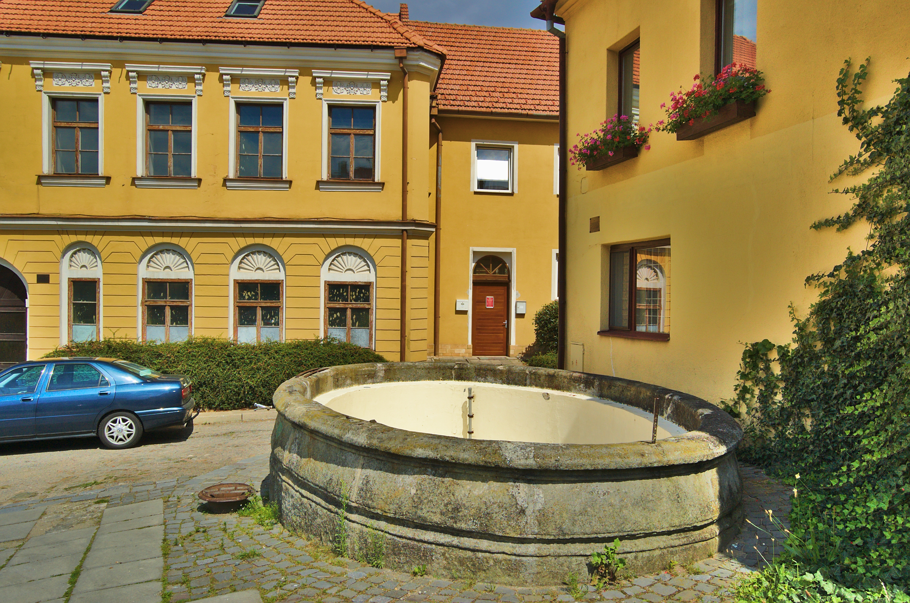 Kašna v ulici U koupadel, Boskovice, okres Blansko